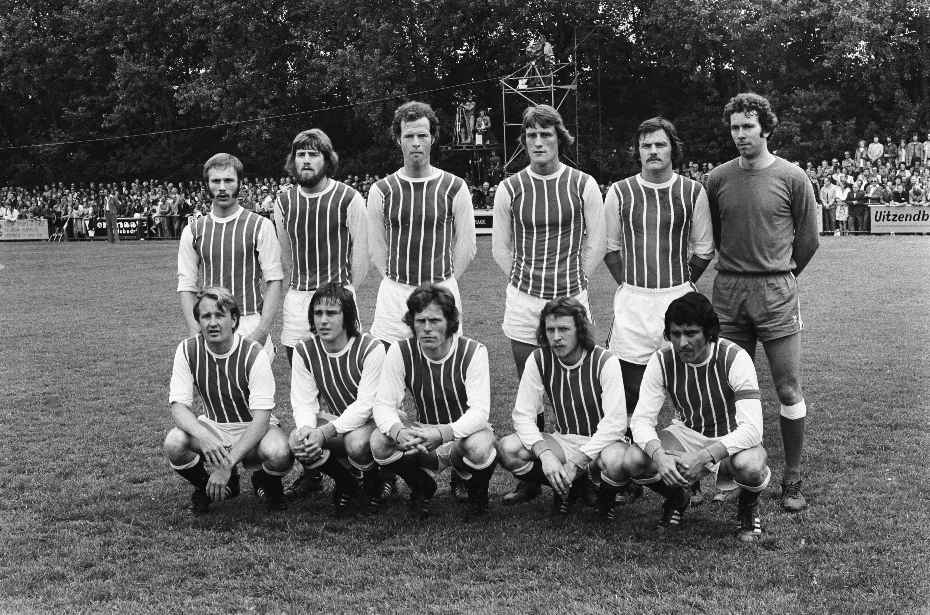 Collectie / Archief : Fotocollectie Anefo Reportage / Serie : Landskampioenschap voetbal amateurs; Spijkenisse (kampioen zaterdagamateurs) tegen Emmen (kampioen zondagamateurs): 1-0 Beschrijving : Elftal van Spijkenisse Datum : 14 juni 1975 Locatie : Spijkenisse, Zuid-Holland Trefwoorden : elftallen, kampioenen, spelers, sport, voetbal Fotograaf : Fotograaf Onbekend / Anefo Auteursrechthebbende : Nationaal Archief Materiaalsoort : Negatief (zwart/wit) Nummer archiefinventaris : bekijk toegang 2.24.01.05 Bestanddeelnummer : 927-9895